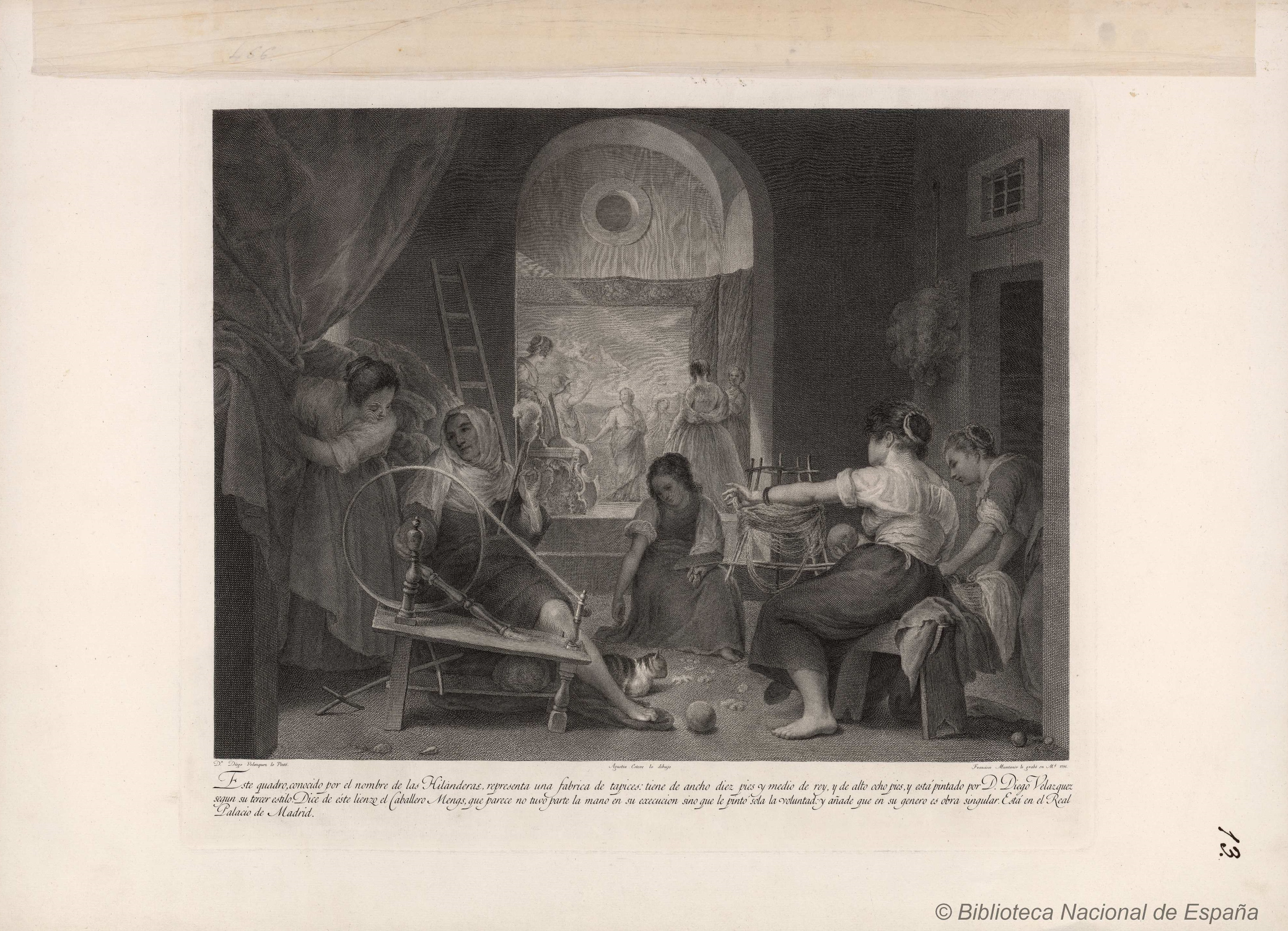 Las Hilanderas, aguafuerte y buril sobre papel continuo grabado por Francisco Muntaner según dibujo de Agustín Esteve, reproducción del cuadro de Diego Velázquez ahora en el Museo del Prado. Biblioteca Nacional de España